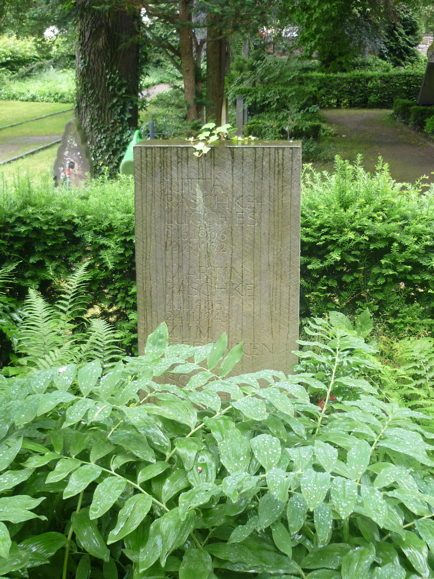 Loschwitzer Friedhof in Dresden-Loschwitz: Grabstätte Martin Raschke (1905–1943), Schriftsteller